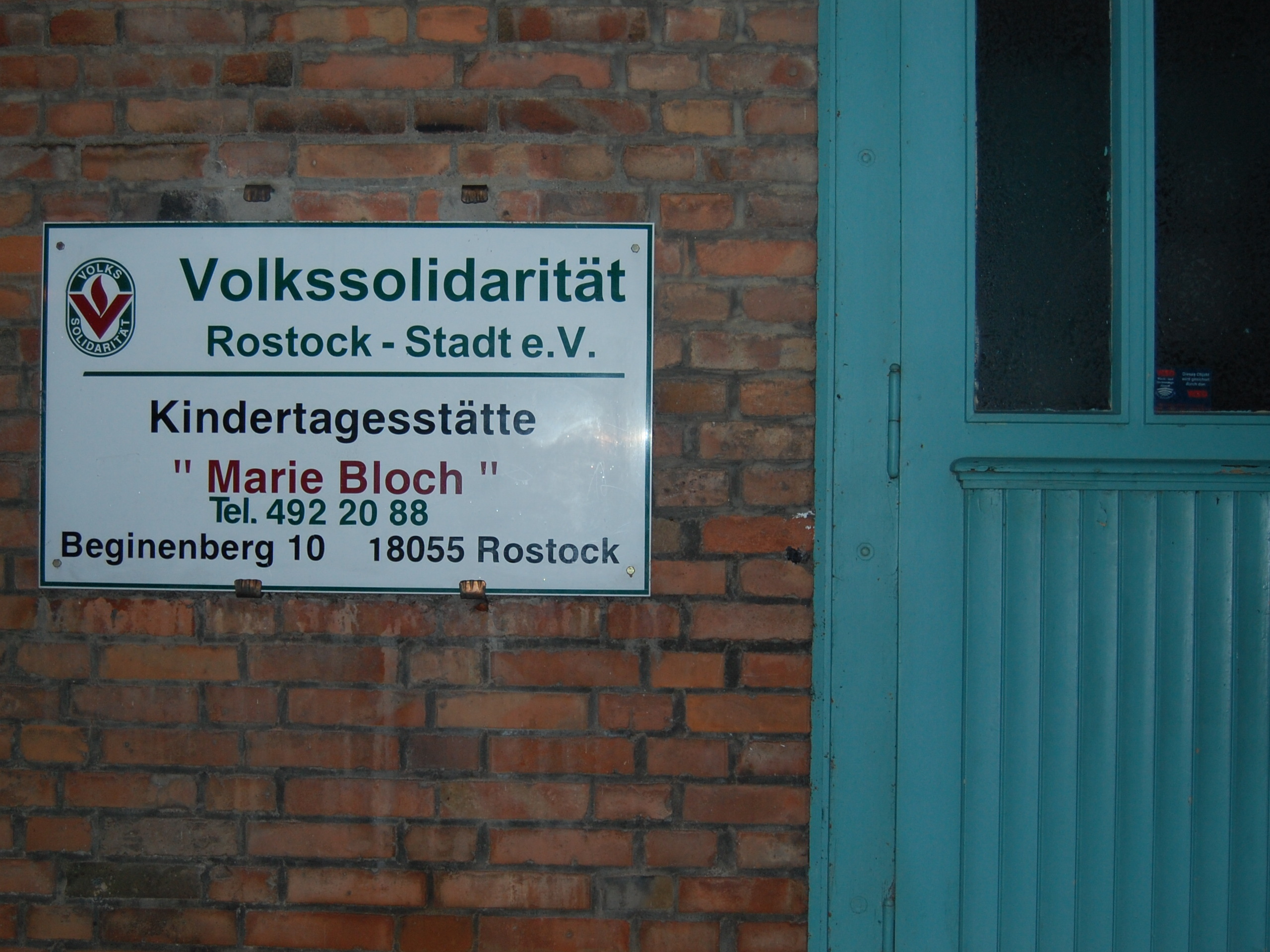 Marie Bloch ist seit 1989 Namenspatronin für die Kindertagesstätte Am Beginenberg 10.